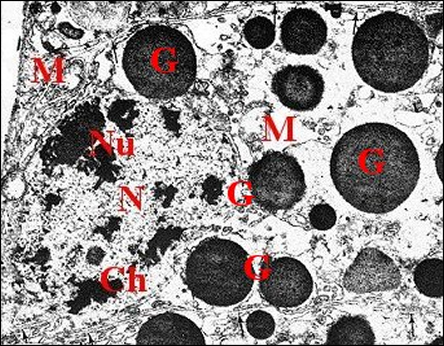 Partie basale d'adénocyte prégonoporal de Pholcus phalangioides avec le noyau. Microscopie électronique.